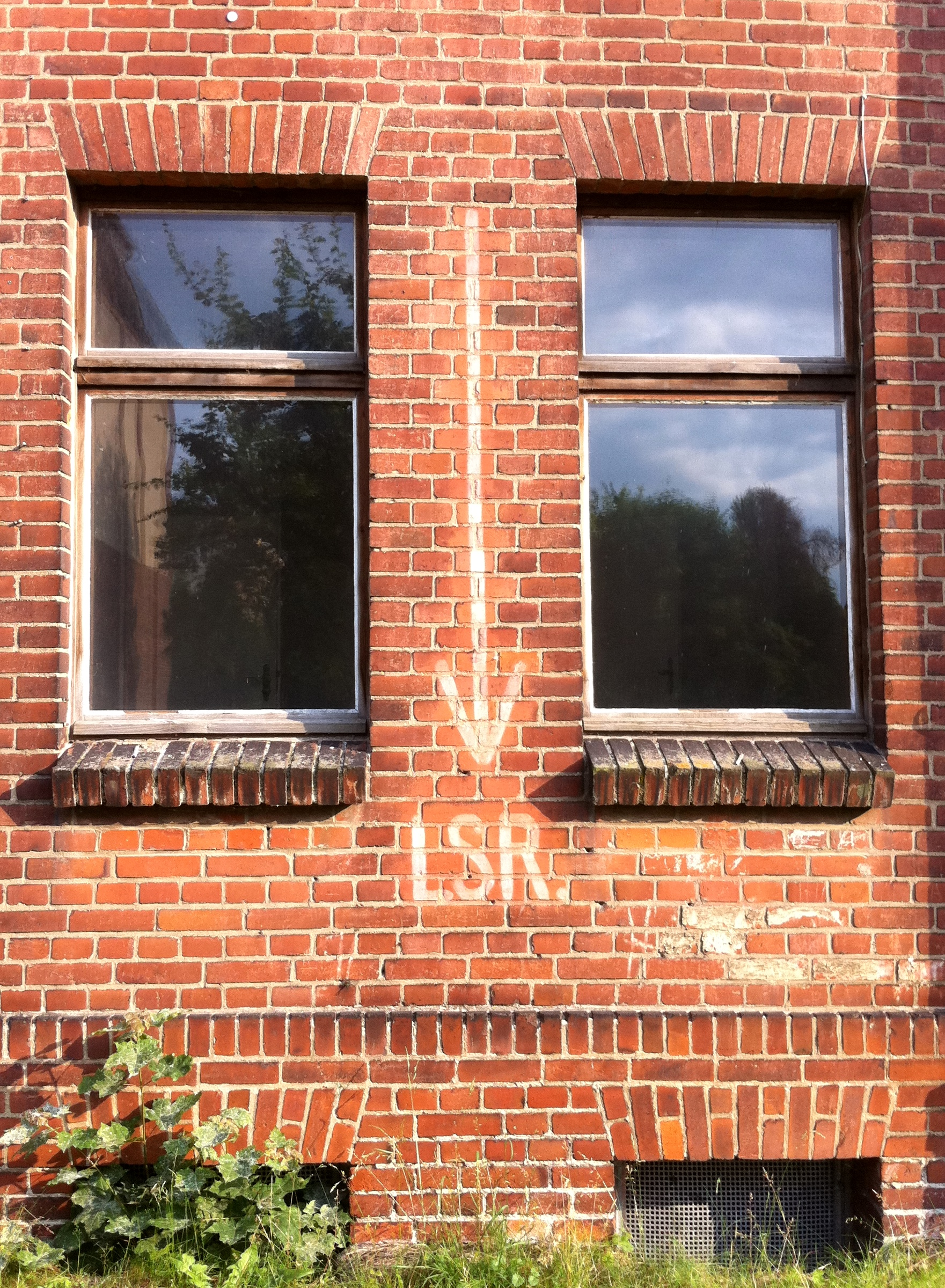 Hinweis "LSR" (Luftschutzraum) an einem Haus im Freundschaftsweg in Salbke